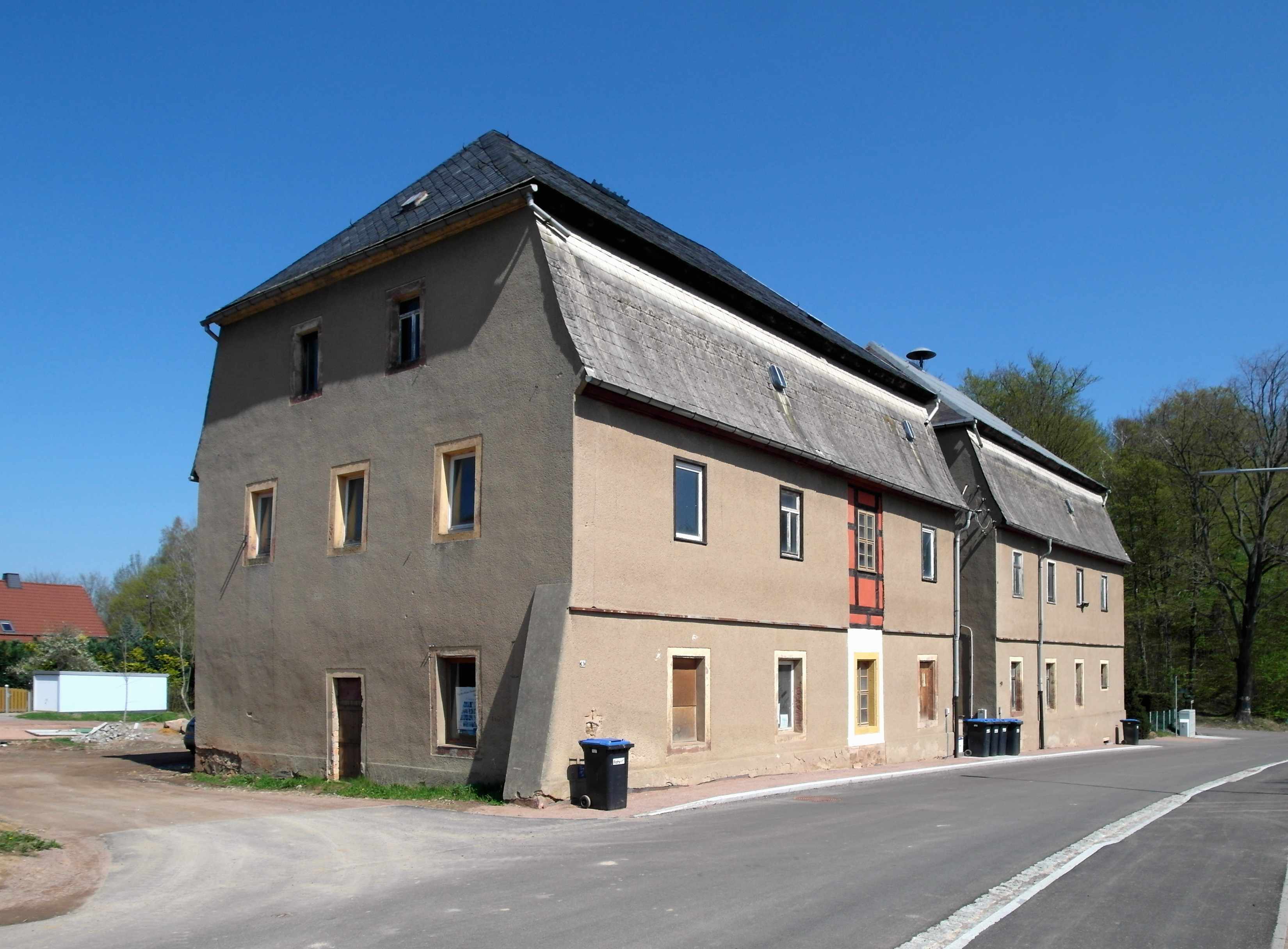 18.04.2018 09648 Kriebstein: Rittergut, Herrenhaus Kriebsteiner Straße 8 und 9 (GMP: 51.043346,13.013809). Zur Burg Kriebstein gehörte auch ein Rittergut, das sich oberhalb der Burg an der Kriebsteiner Straße, die nach Beerwalde führt, befindet. Die letzten Rittergutsbesitzer bis 1945 waren Erik und Allard von Arnim. [SAM5331.JPG]20180418200DR.JPG(c)Blobelt